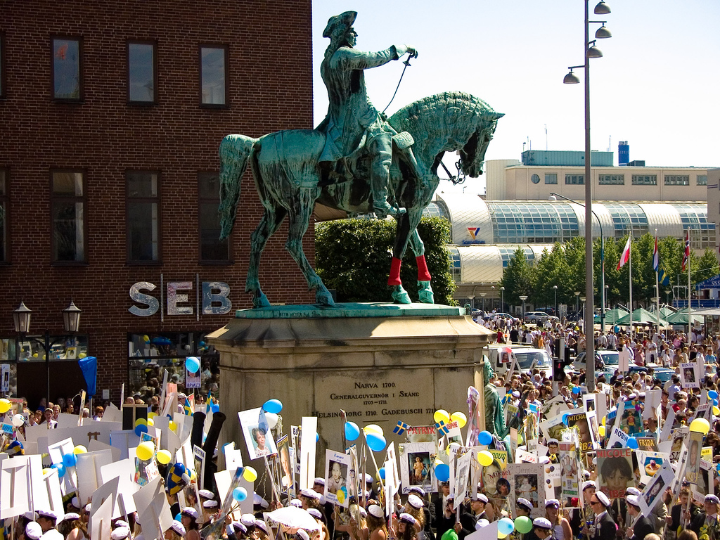 Utexaminerade studenter i Helsingborg går sju varv runt Magnus Stenbock-statyn